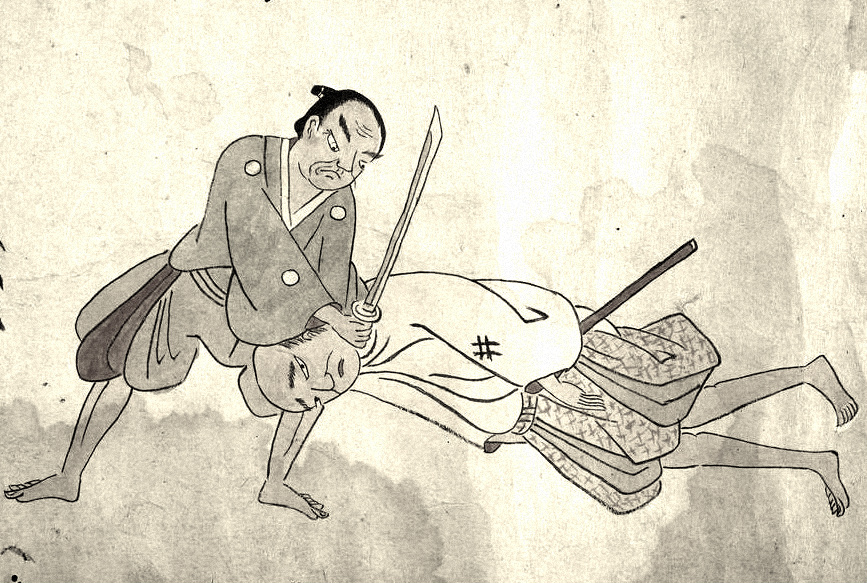 白刃捕り 絵